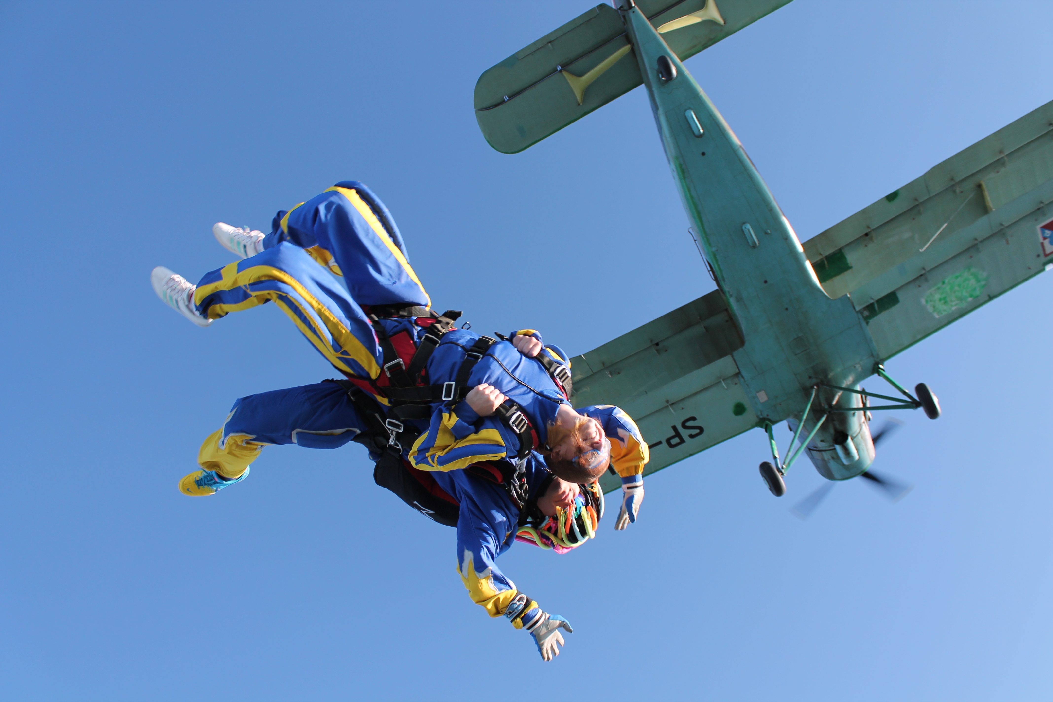 Instruktor Marcin Stencel „Bombola“ z pasażerem (skok w tandemie). Skok z samolotu z An-2P - Sekcja Spadochronowa Aeroklubu Gliwickiego